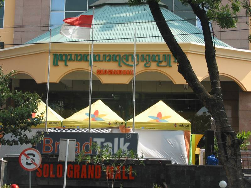 Solo Grand Mall, Surakarta